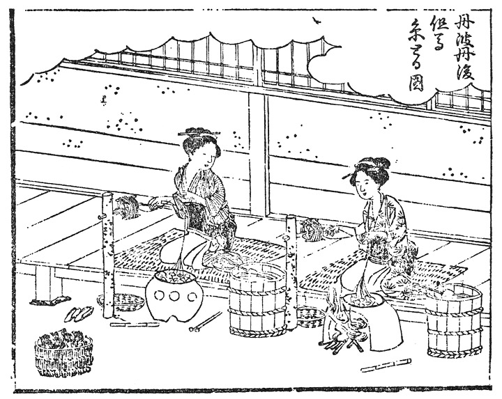 上垣守国 作 ; 西村中和,速水春暁斎 画『養蚕秘録』 丹後・丹波・但馬地方の江戸時代以前における糸繰りの様子